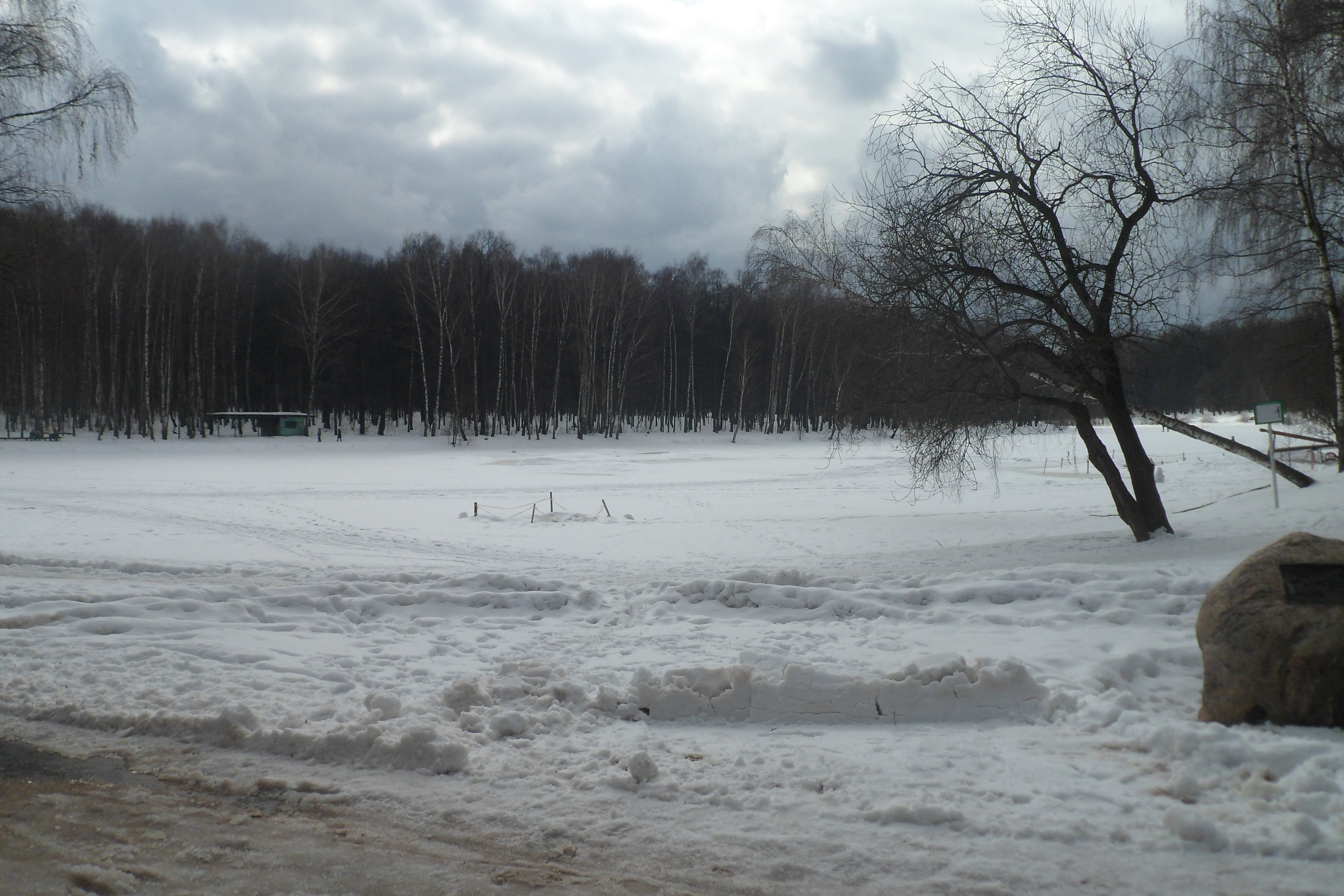 Красный пруд в Измайловском парке.